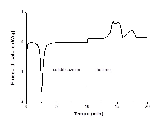 fotografia calorimetrica dell'OEVO